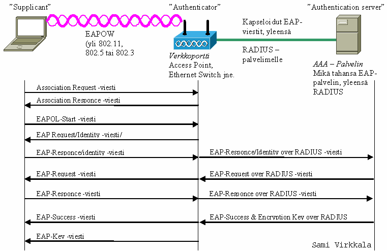 Kuvan nimi:IEEE 802.1x Autentikointi proceduuri. Kuvan tekijänoikeudet omistaa: Sami Virkkala